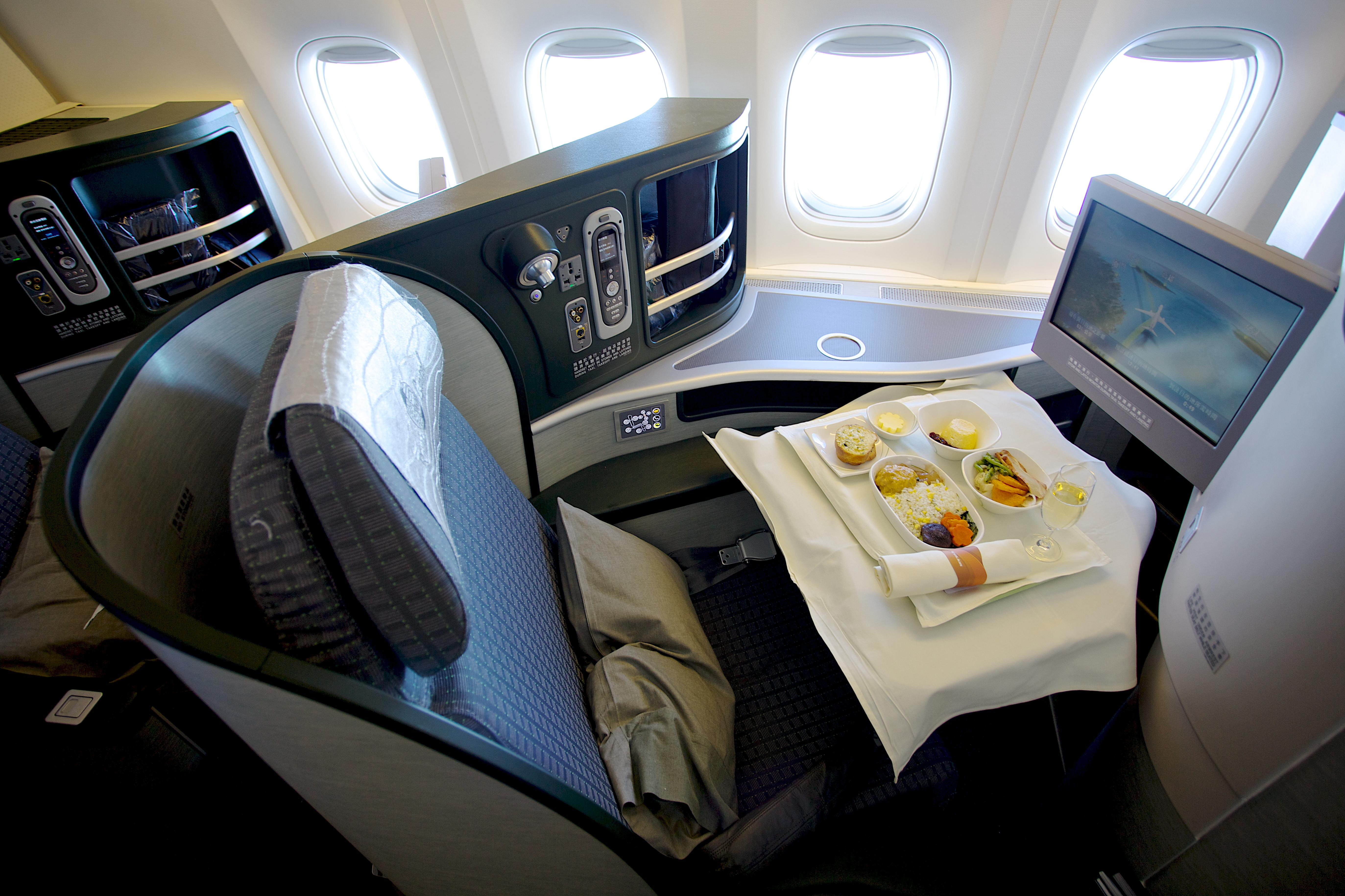 BR852 | EVA AIR | Royal Laurel Class